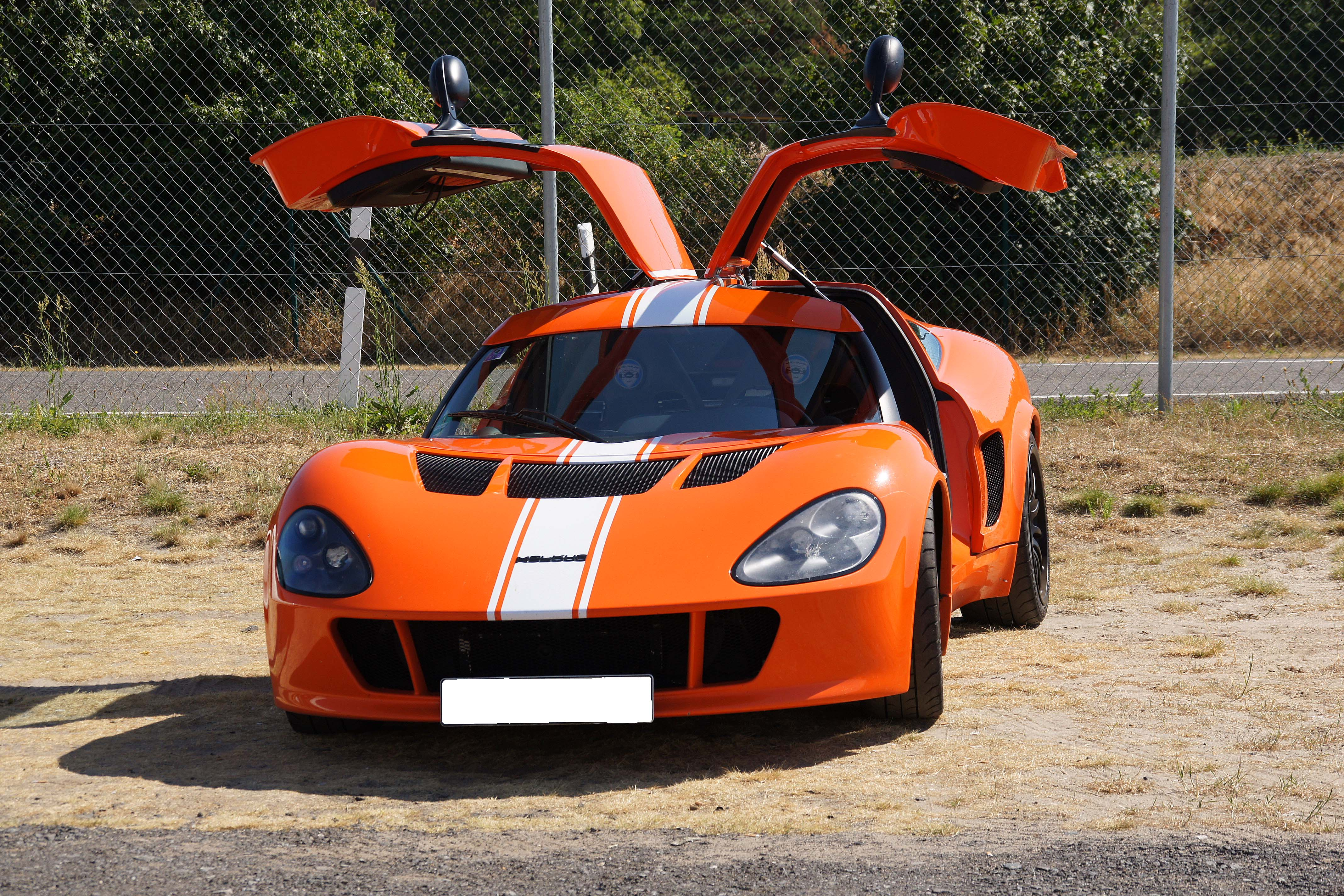 Melkus RS2000 am Spreewaldring